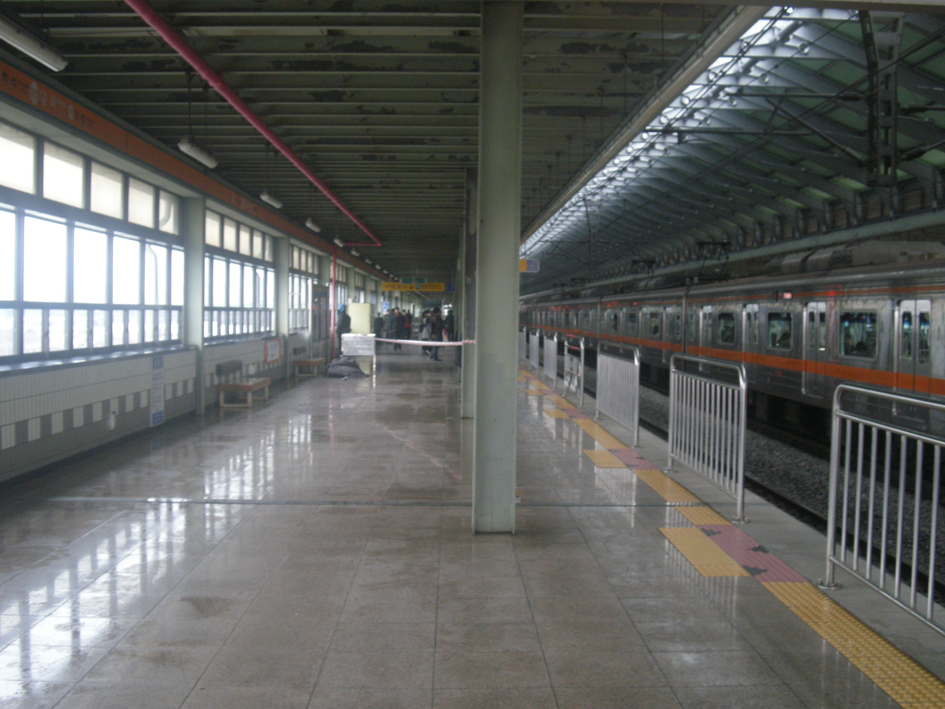 일산선 (수도권 전철 3호선) 대곡역 대화 방면 승강장